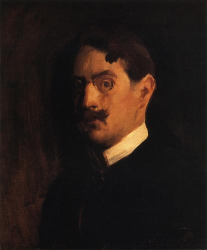 Self-portrait